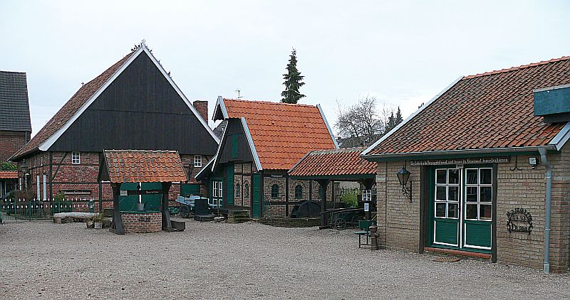 Handwerksmuseum Bocholt, eigenens Bild